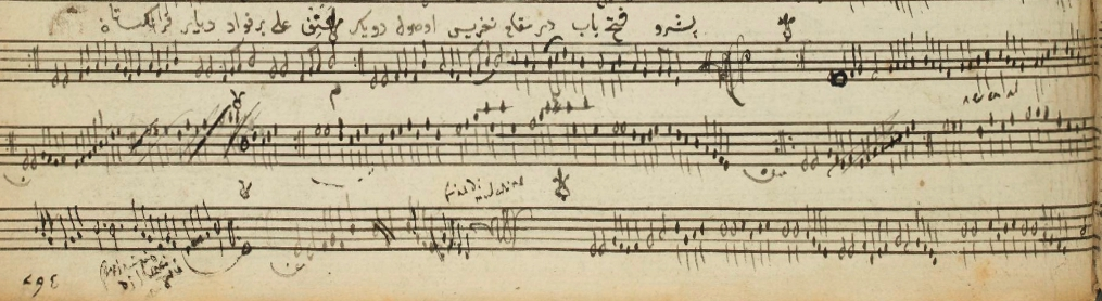 peşrev feth-i bâb der makam nigris usul Düyek teʾlif Ali ber fuad-ı diyar-ı frengistan Aus der später gebundenen Loseblattsammlung Ali Ufkis. Heute in der Bibliothèque nationale de France, Département des manuscrits, Turc 292. Skizzenartige Version des Nikrîz Peşrev von Ali Ufki, BfN Turc 292 Fol. 282r (Ausschnitt).